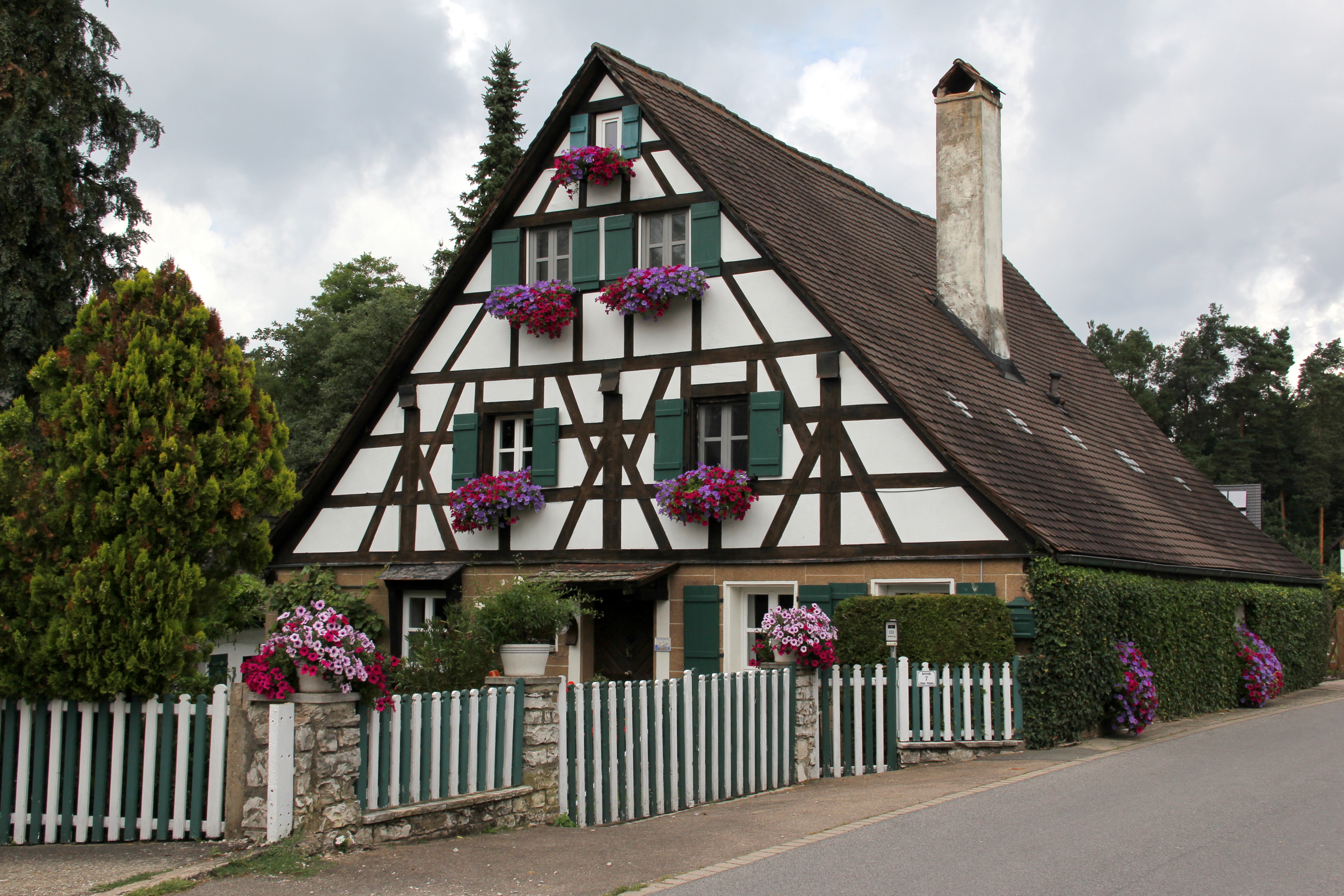 Ungelstetten, Winkelhaid, Cafe Scheune